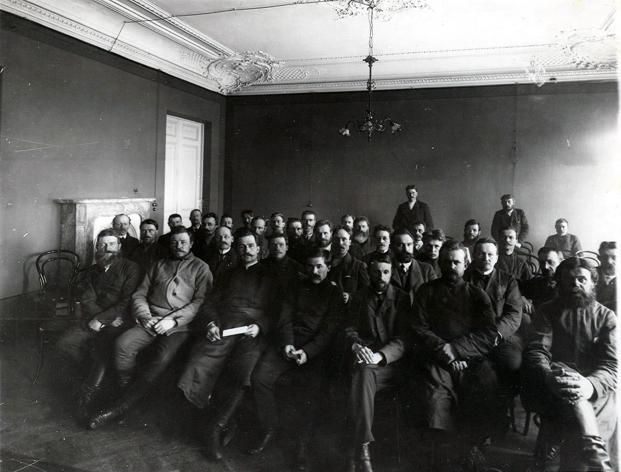 Трудовая группа 2-й Государственной Думы на совещании фракции (Таврический дворец, Санкт-Петербург, 1907). Трудовая группа 2-й Государственной Думы на совещании фракции. В третьем ряду депутаты от Вологодской губернии: четвертый слева- Шаманин, пятый - Малафеевский и шестой - Щипин.